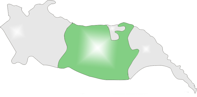 kendim yaptım